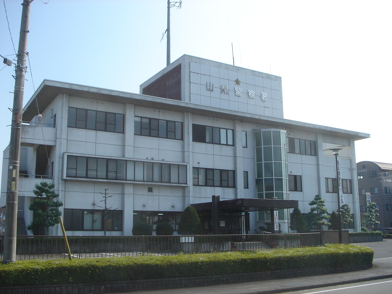 Yamagata Police station in Gifu Pref(山県警察署),Yamagata,Gifu,Japan(岐阜県山県市)で撮影。